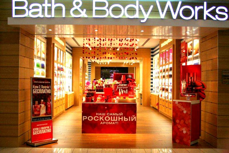 Магазин Bath & Body Works